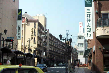 住友銀行とさくら銀行の合併直後の様子（後に、旧住友銀行芦屋支店は閉鎖されている）